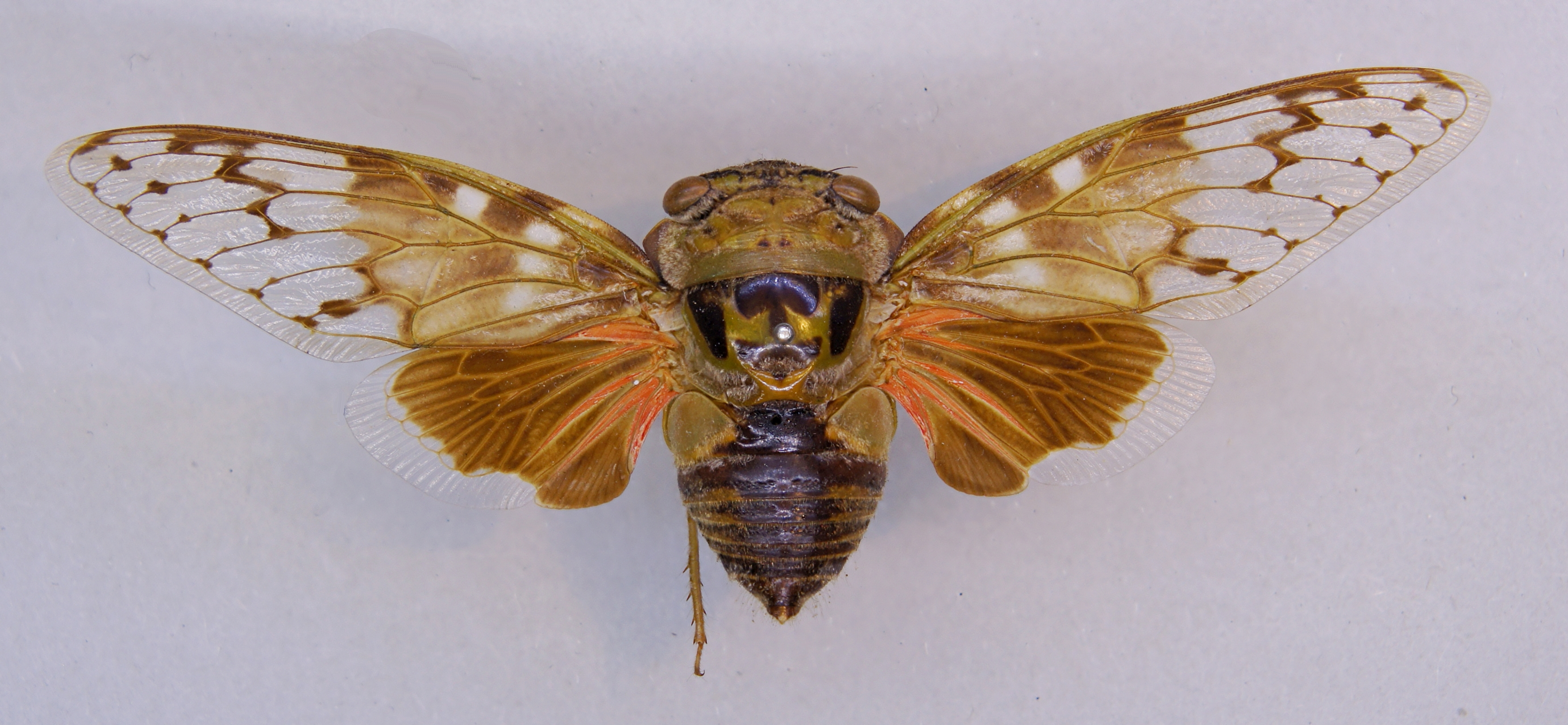 Platypleura octoguttata (Fabricius,1798) Herkunft: Ceylon